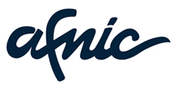 Association Française pour le Nommage Internet en Coopération